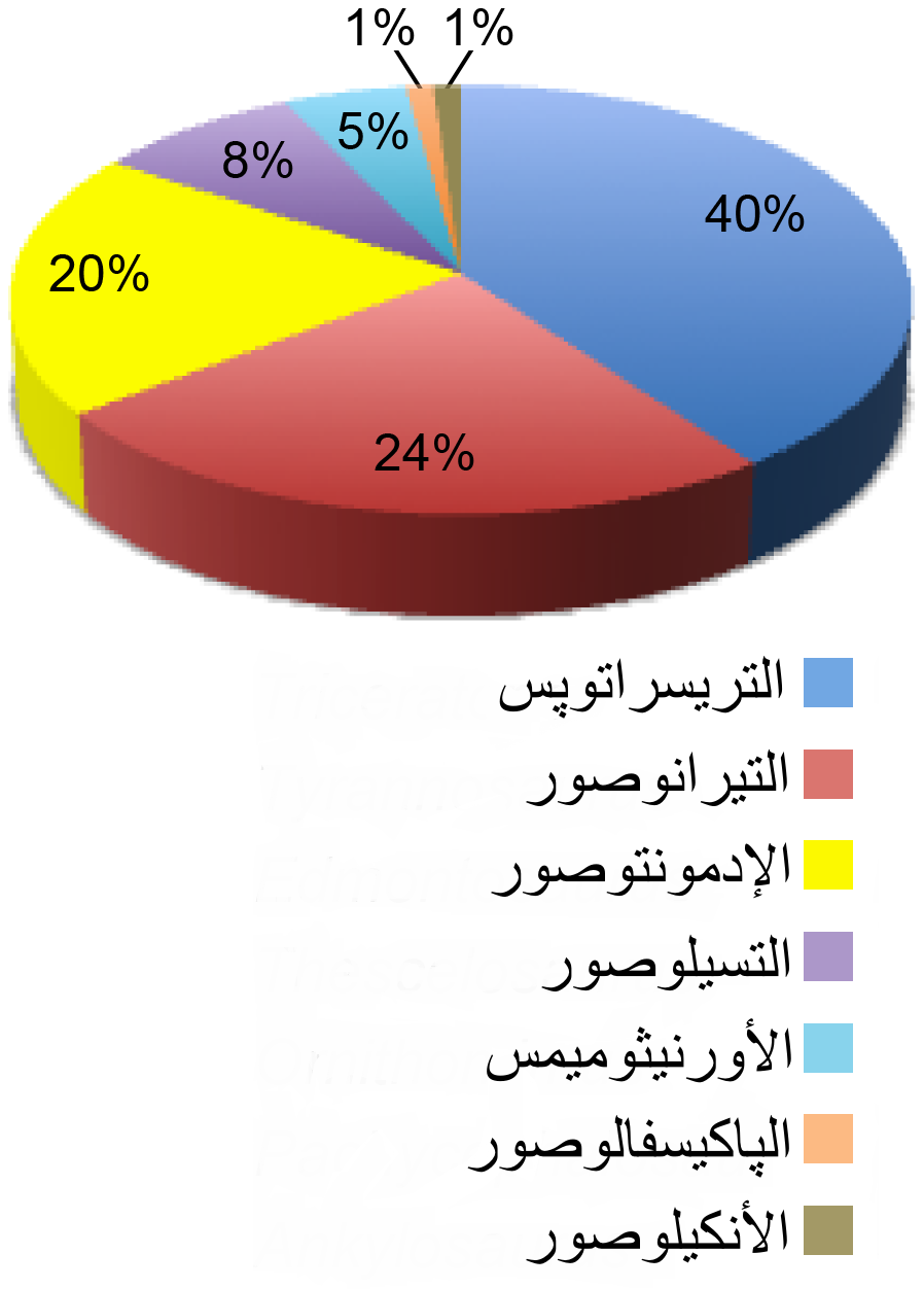 رسمٌ بيانيٌّ دائريٌّ يُظهرُ النسب التقريبيَّة لِمُستحاثات الديناصورات التي تمَّ العُثور عليها في كافَّة أنحاء تكوينة هل كريك الصخريَّة في الولايات المُتحدة الأمريكيَّة.